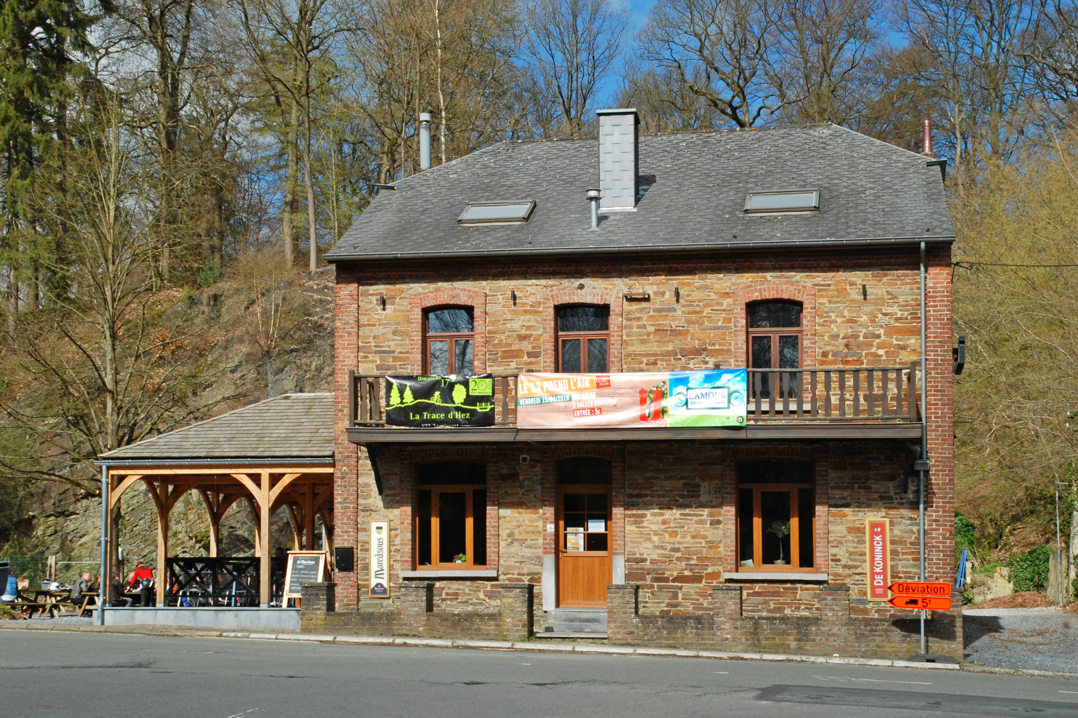 Belgique - Brabant wallon - Villers-la-Ville - Châlet de la Forêt (face à la Porte de Bruxelles)